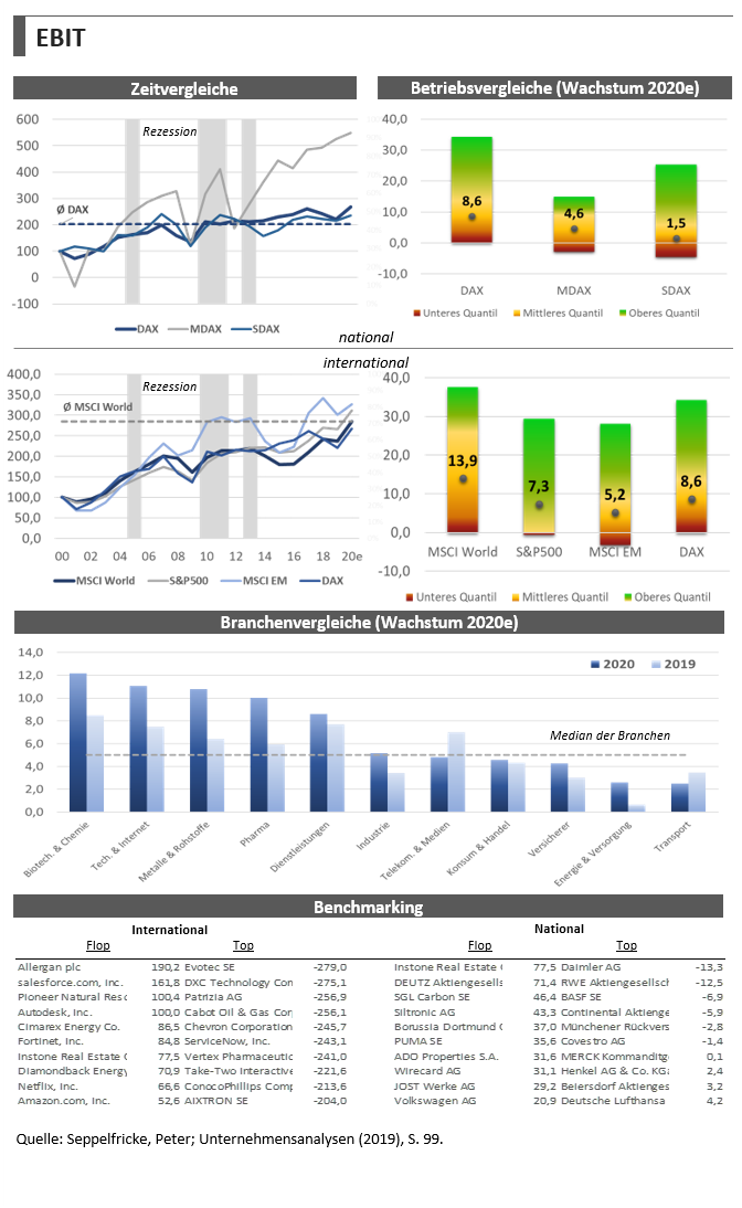 Entwicklung des EBIT von börsennotierten Unternehmen.